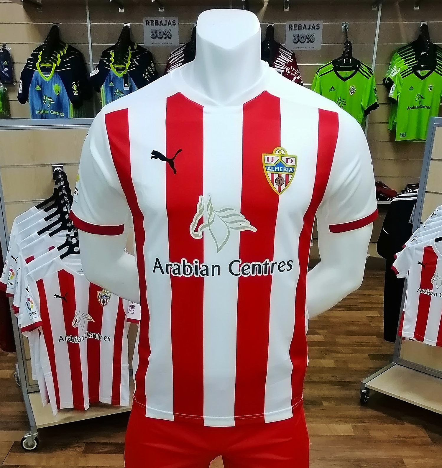 Camiseta de la primera equipación de la U.D. Almería para la temporada 2020-2021.